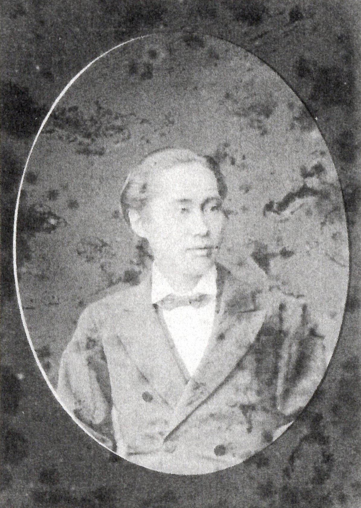 水野忠弘の肖像写真。